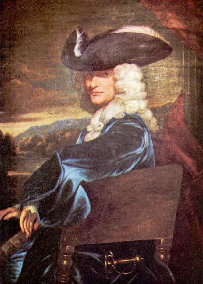 Retrato de Félix Gazzola (1698-1780).